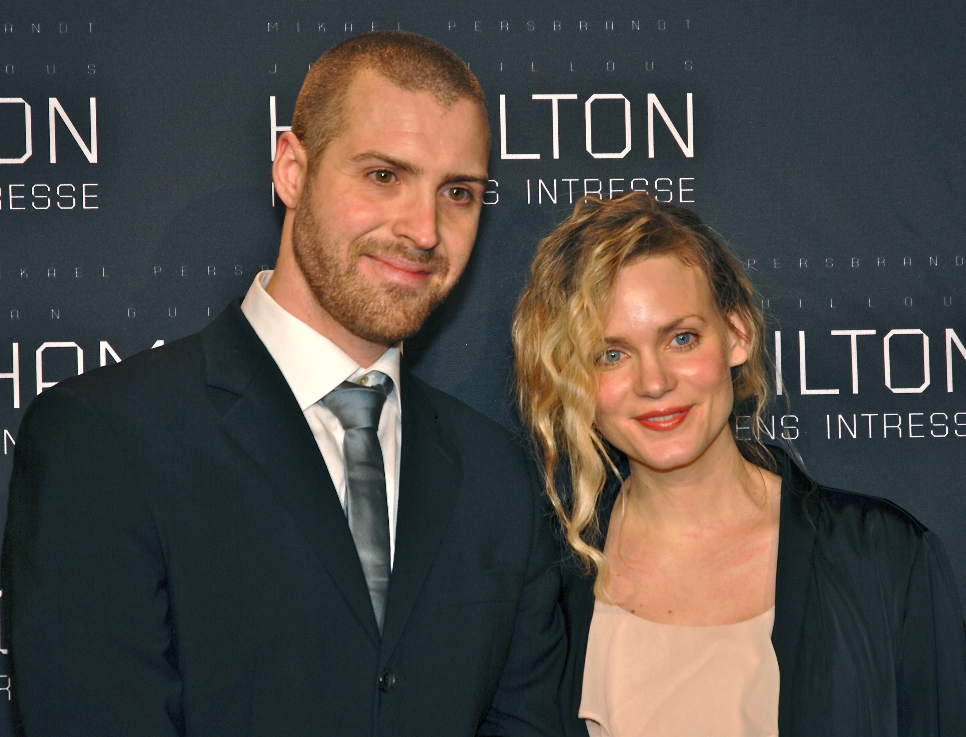 Michael Strix och Liv Mjönes på galapremiären av Hamilton - I nationens intresse, på biograf Sergel i Stockholm den 9 januari 2012.